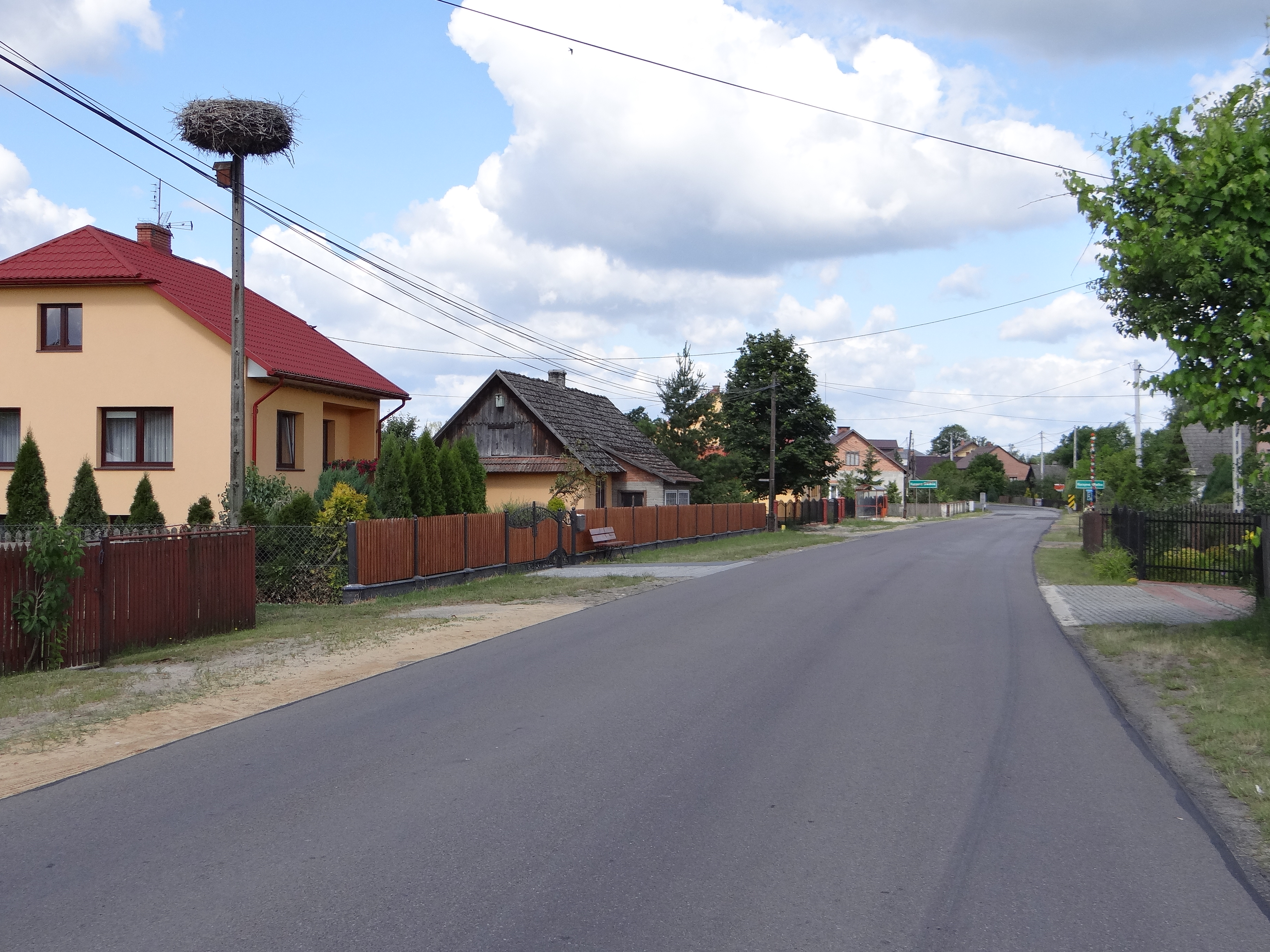 Bocianie gniazdo w miejscowości Kurzyna Wielka.